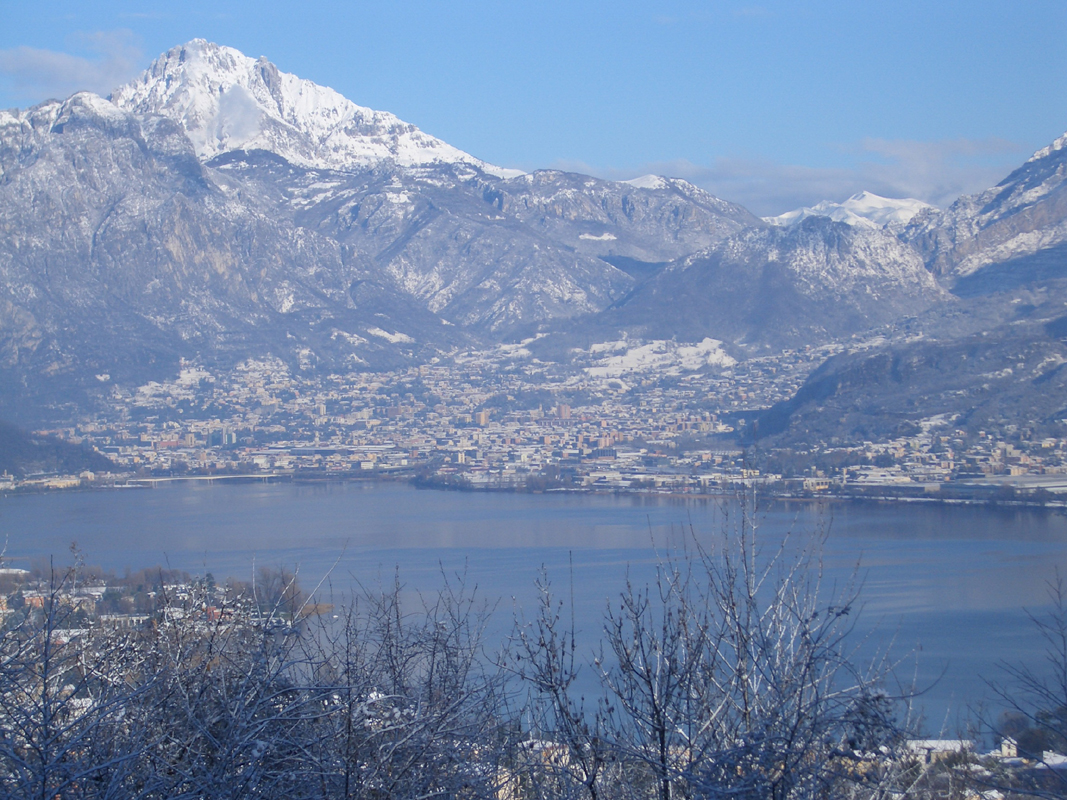 La Grignetta, Lecco ed il lago di Garlate; fotografia scattata da Consonno il 26 dicembre 2008.